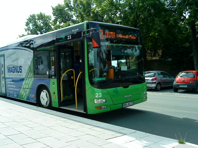 Wagen 23 als Linie 2 der Stadtwerke Hamm am Bahnhof Bockum-Hövel